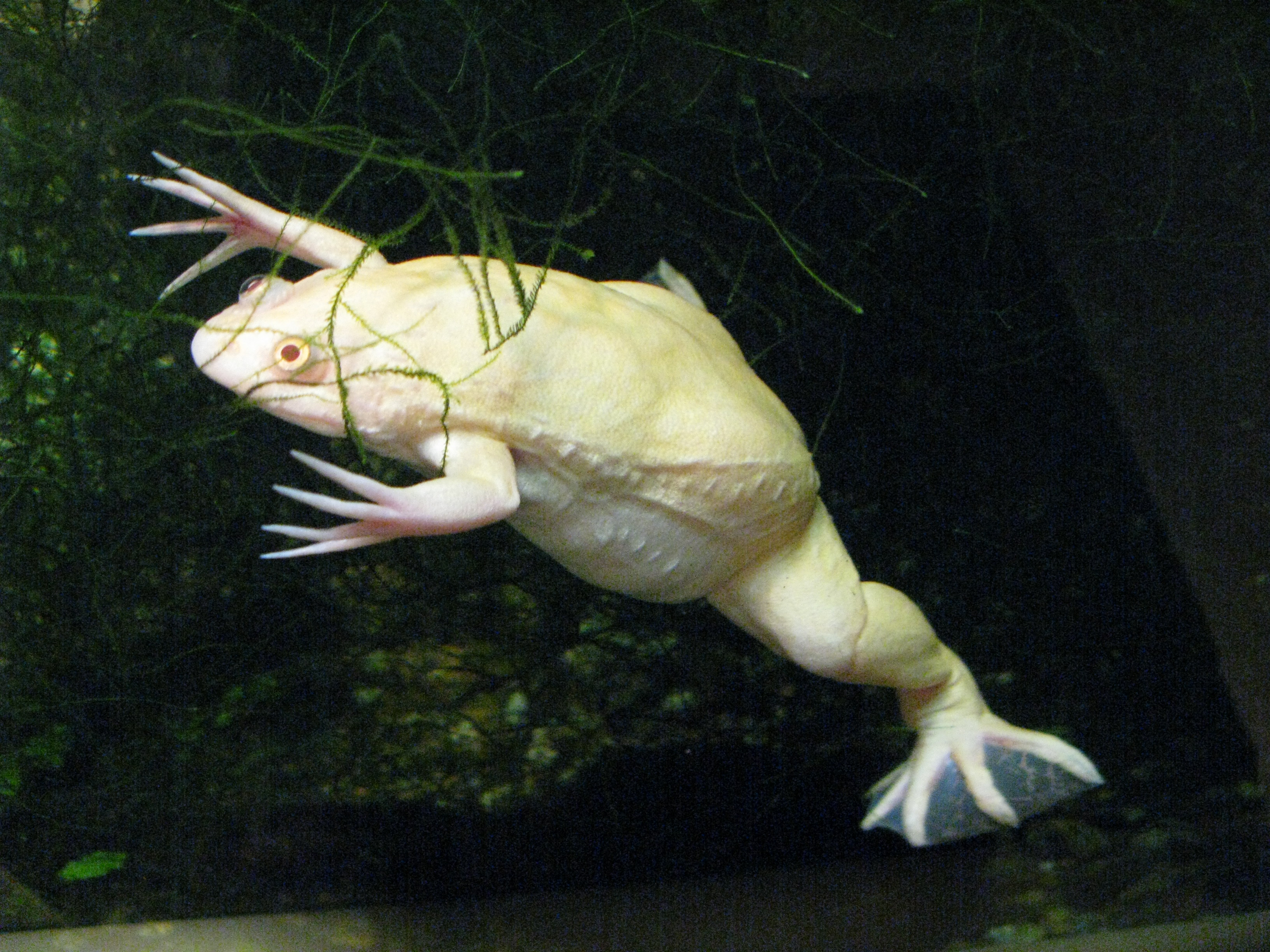 Scientific name Xenopus laevis var. albino